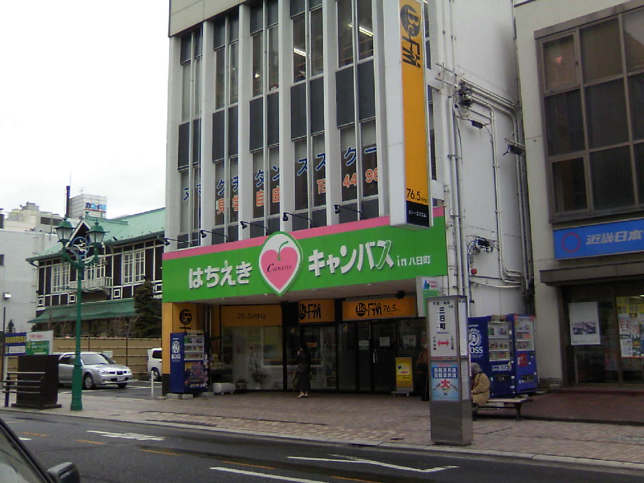 コミュニティーFM BeFM (BeFM - HACHINOHE, AOMORI, JAPAN)